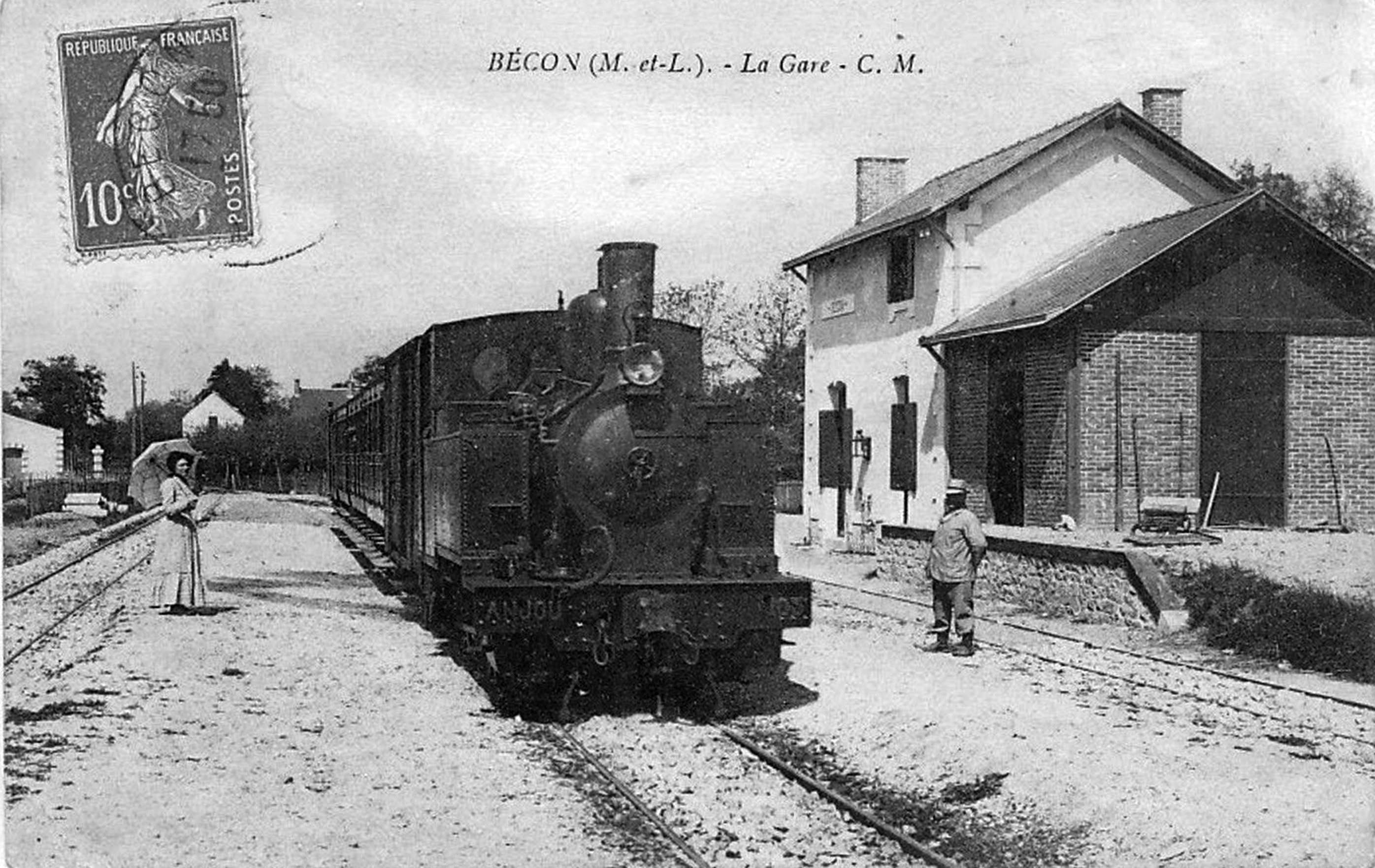 Becon